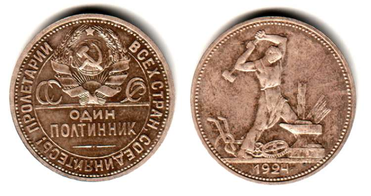 Полтинник (50 копеек) 1924 г. (50 kopecks of 1924)